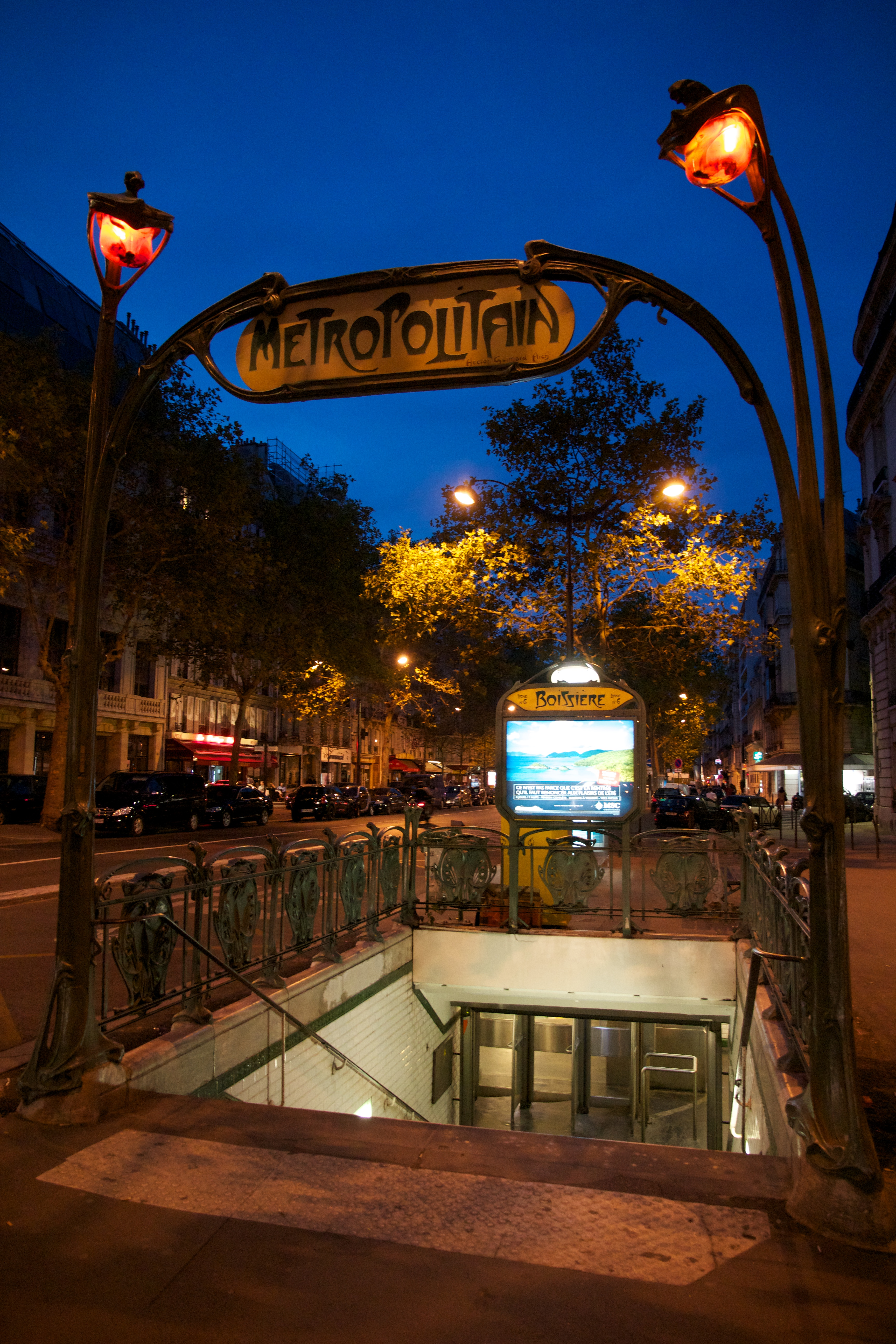 Boissière (Paris Metro)